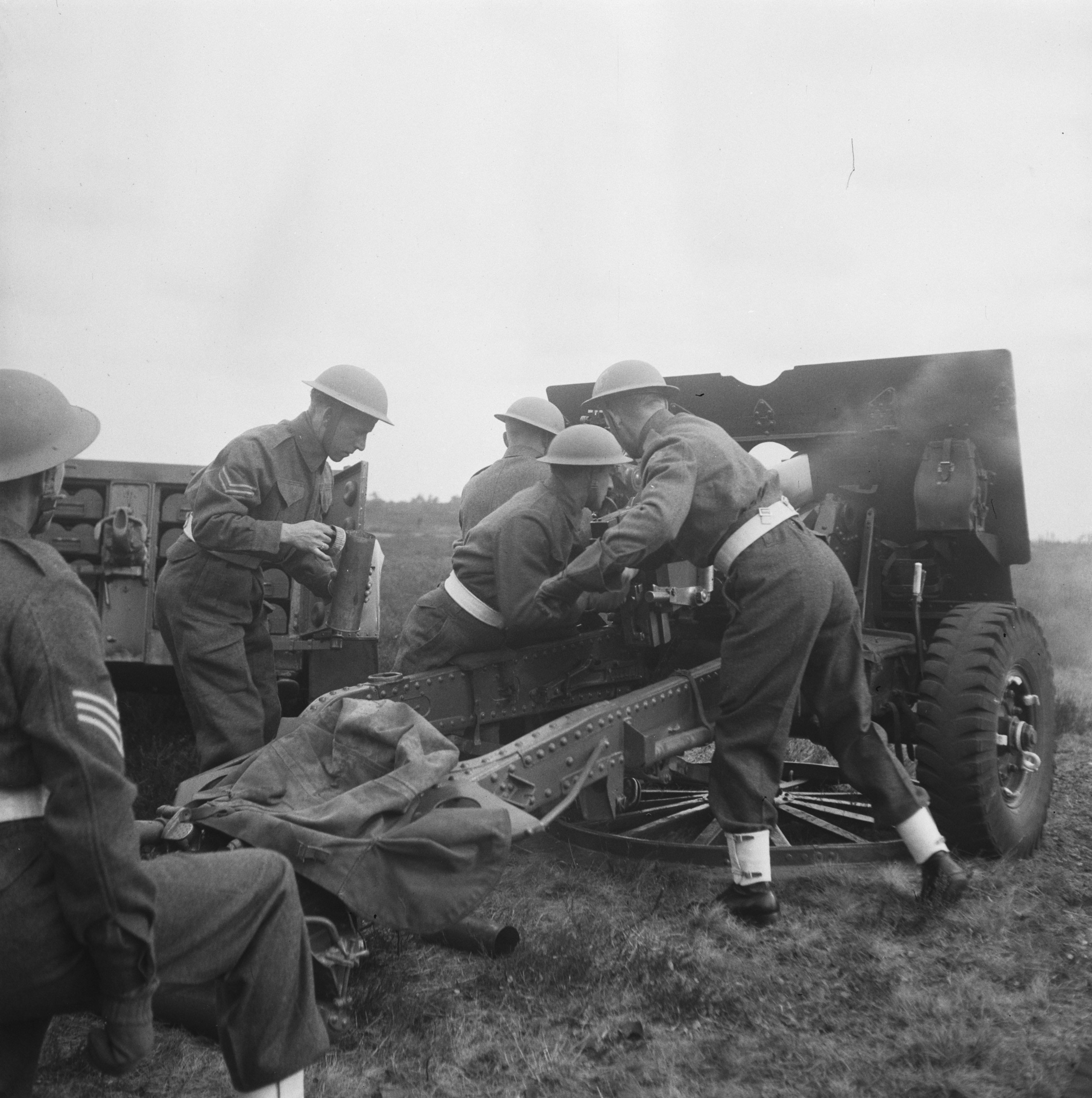 Collectie / Archief : Fotocollectie Anefo Reportage / Serie : [ onbekend ] Beschrijving : Schietoefeningen Oldebroek Datum : 12 april 1946 Locatie : Oldebroek Fotograaf : Breijer, Charles / Anefo Auteursrechthebbende : Nationaal Archief Materiaalsoort : Negatief (zwart/wit) Nummer archiefinventaris : bekijk toegang 2.24.01.03 Bestanddeelnummer : 901-6597